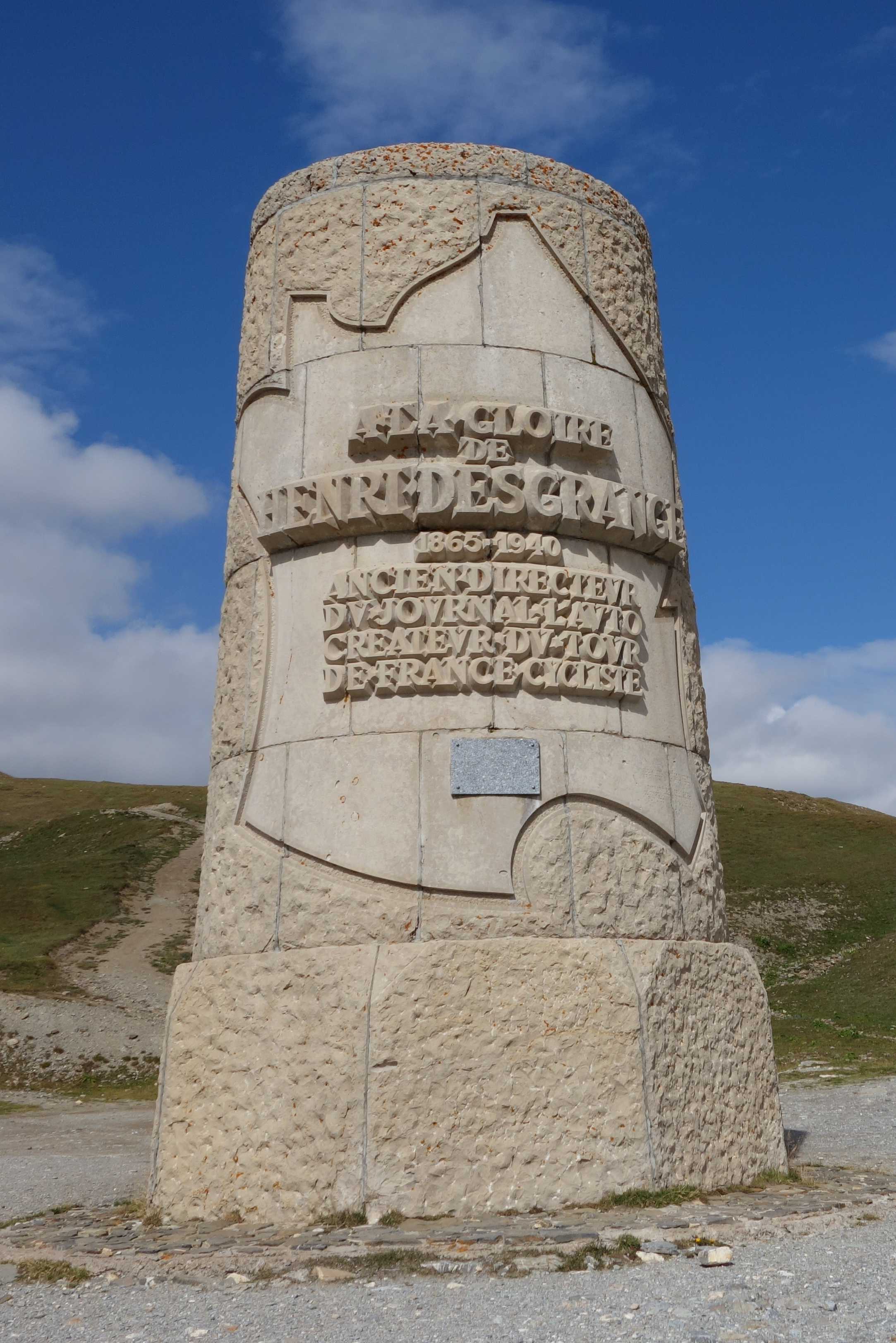 Памятник Анри Денгарнжу рядом с Col du Galibier